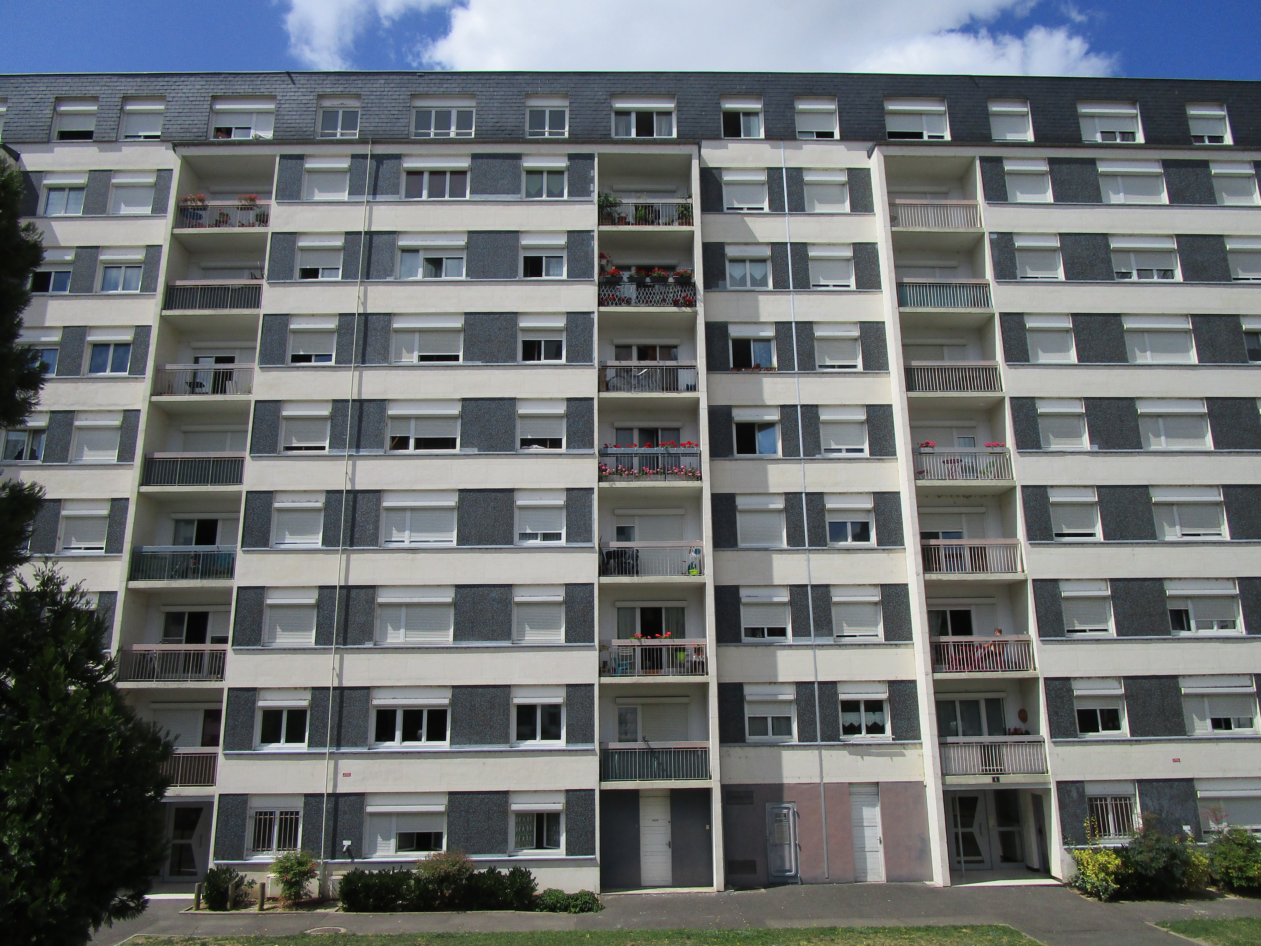 Barre d'immeuble sur la place Massenet, dans le quartier des Fontaines de Tours. Construit en 1975.